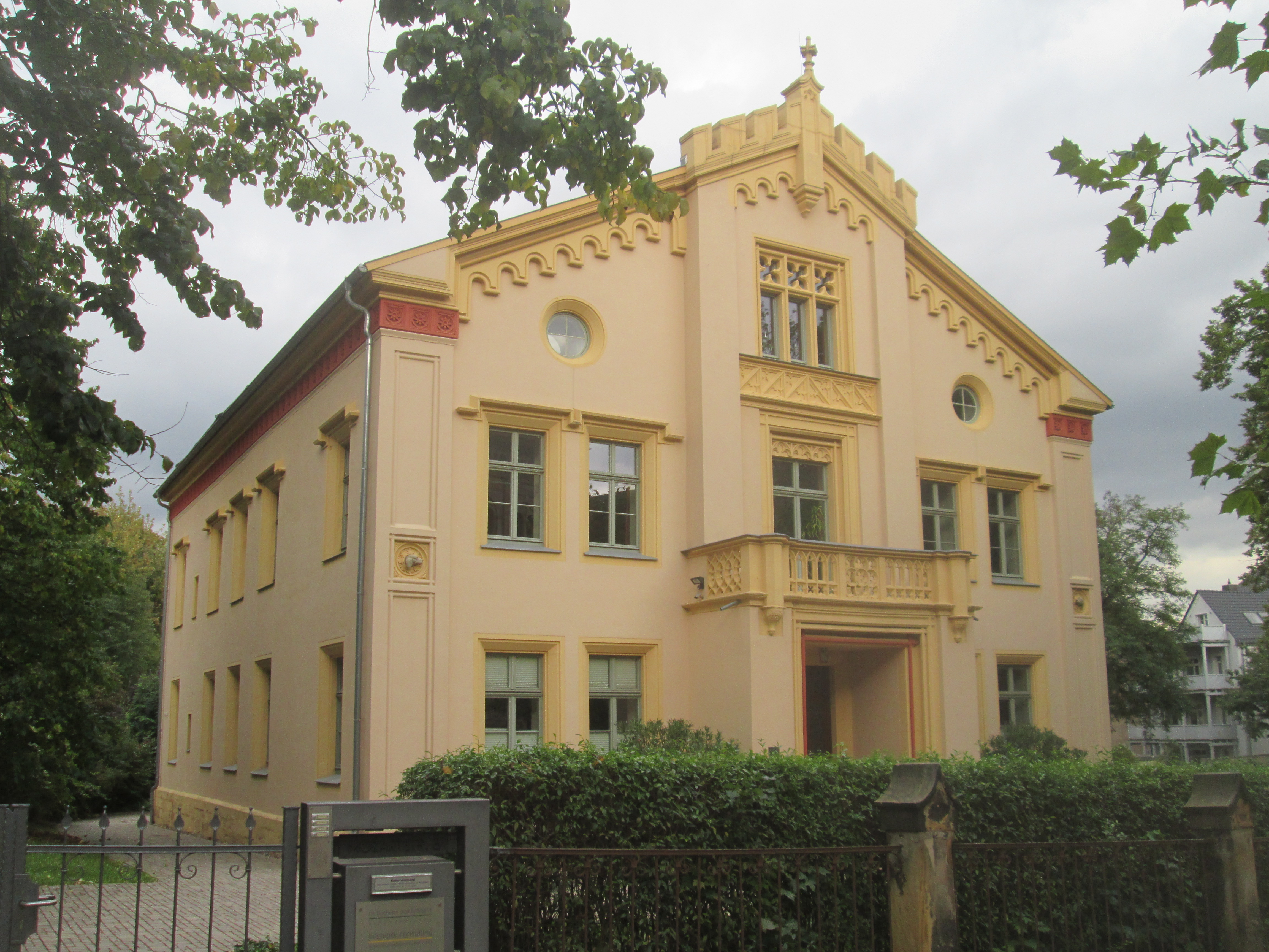 Villa Glenck, Gotha, Detail